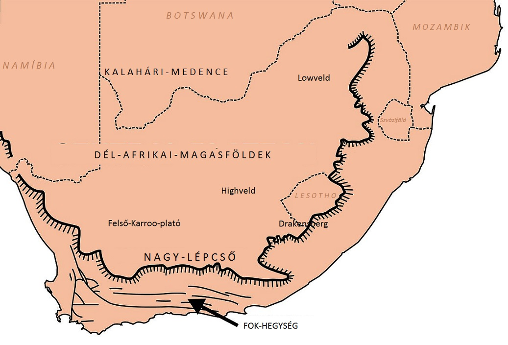 Dél-Afrika földrajzi tájai